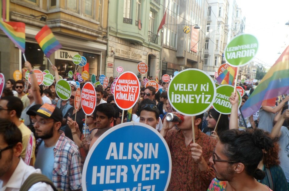 LGBT Onur Haftası Onur Yürüyüşü, 2012, İstiklal Caddesi, Beyoğlu, İstanbul